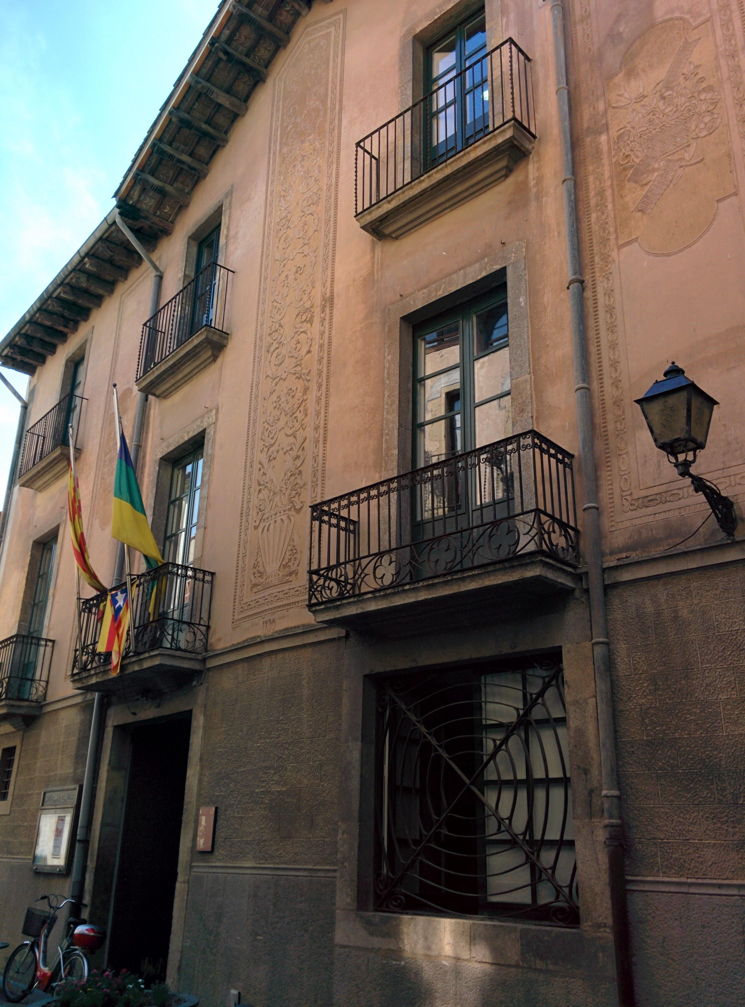 Can Cendra (Anglès)